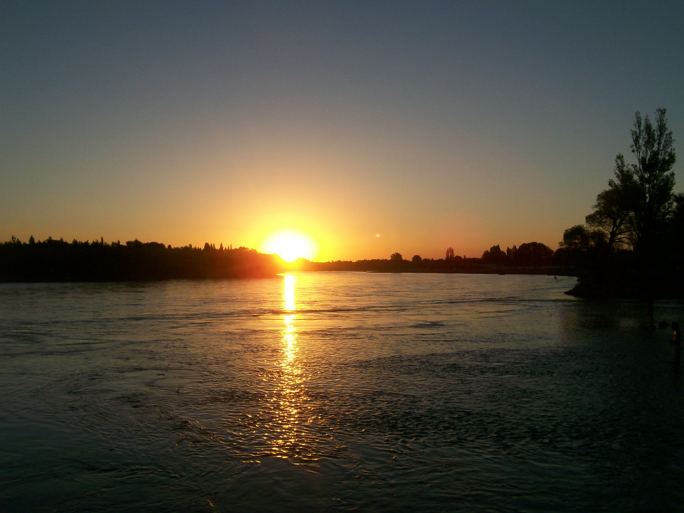 Atardece sobre el río Limay.